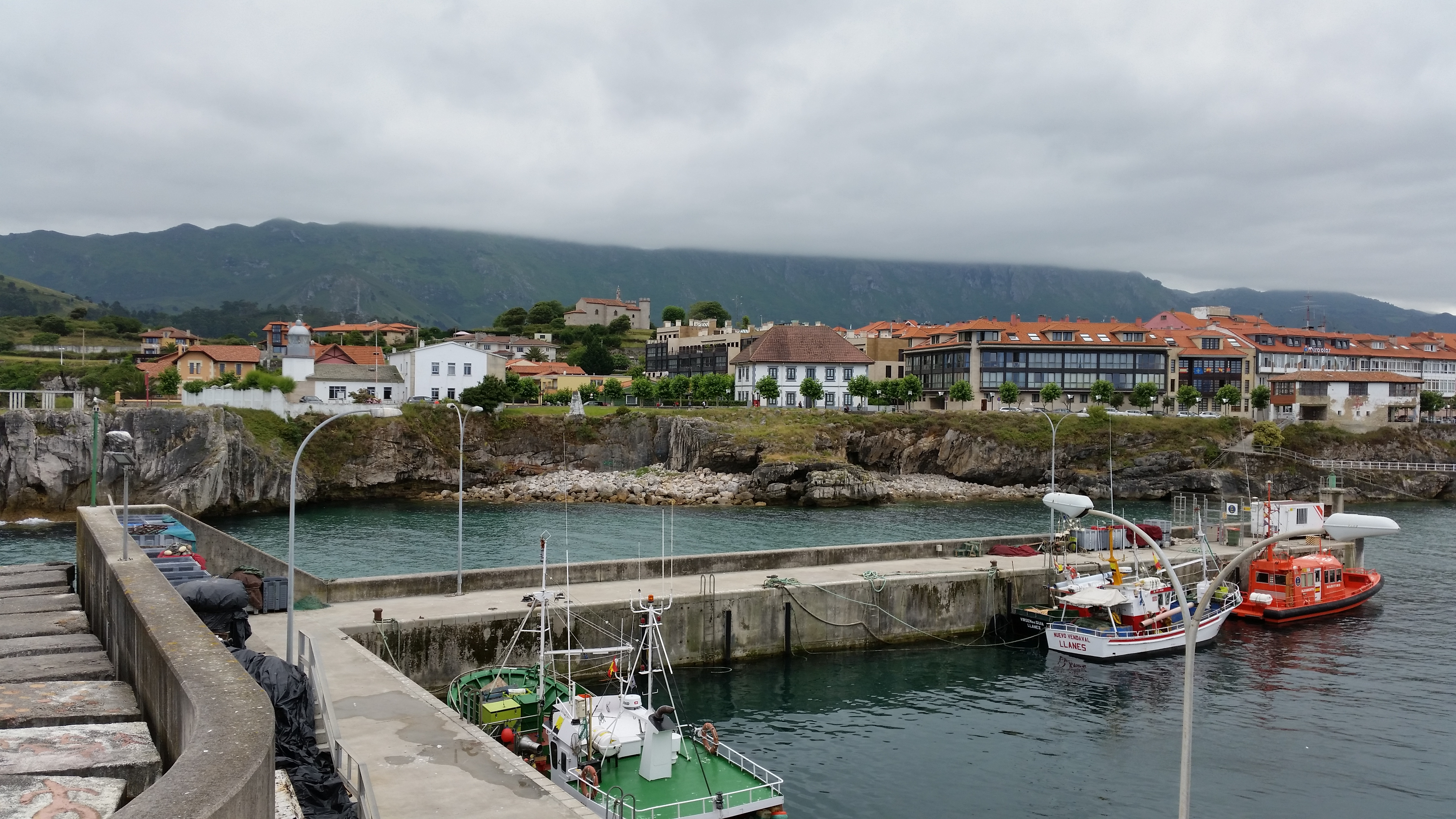 Llanes - Puerto